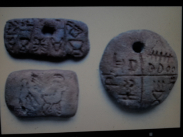 Itt látható a 3 darab a tatárlaki 7 ezer éves találmányból.